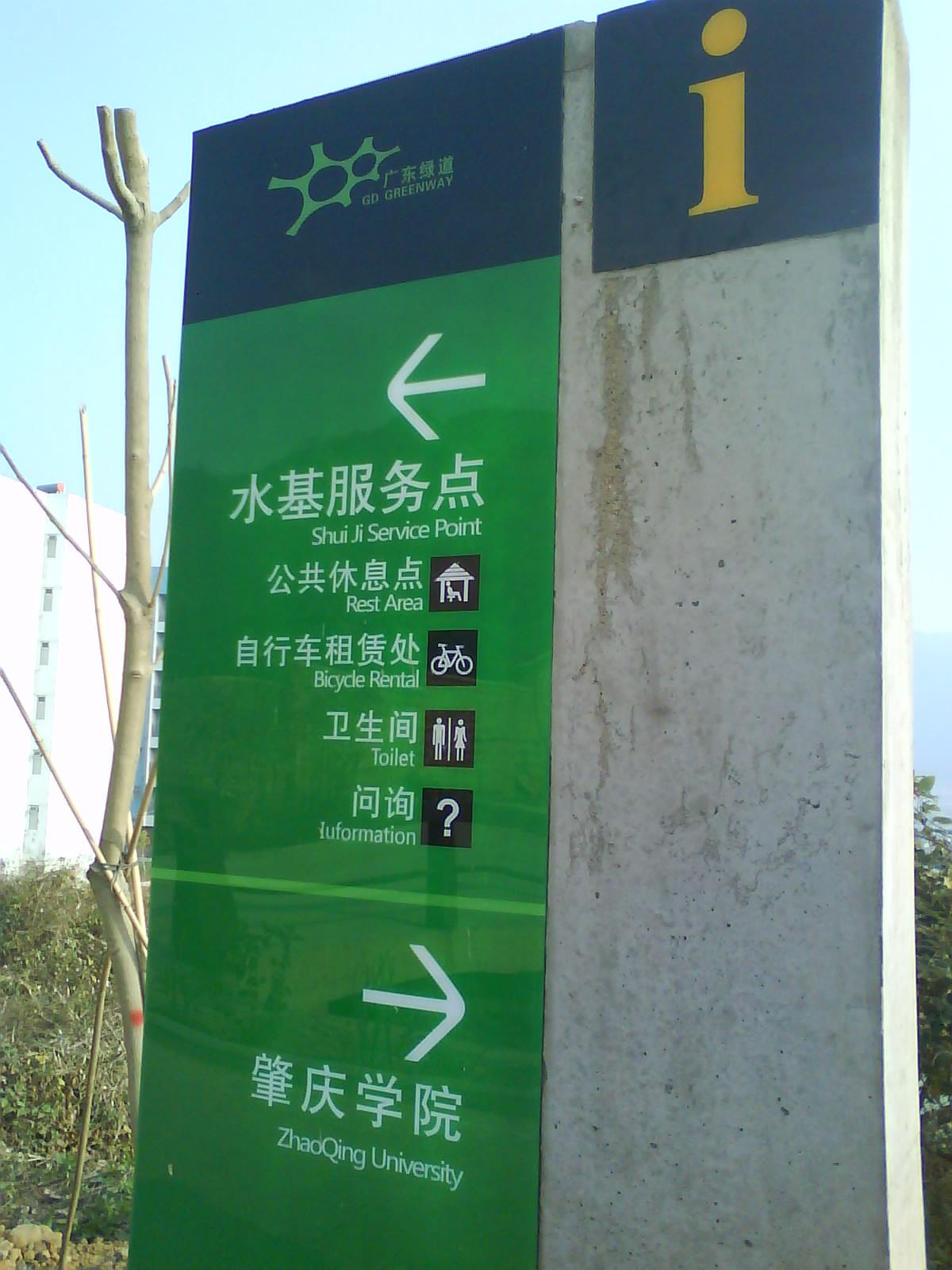 广东绿道端州段提示牌